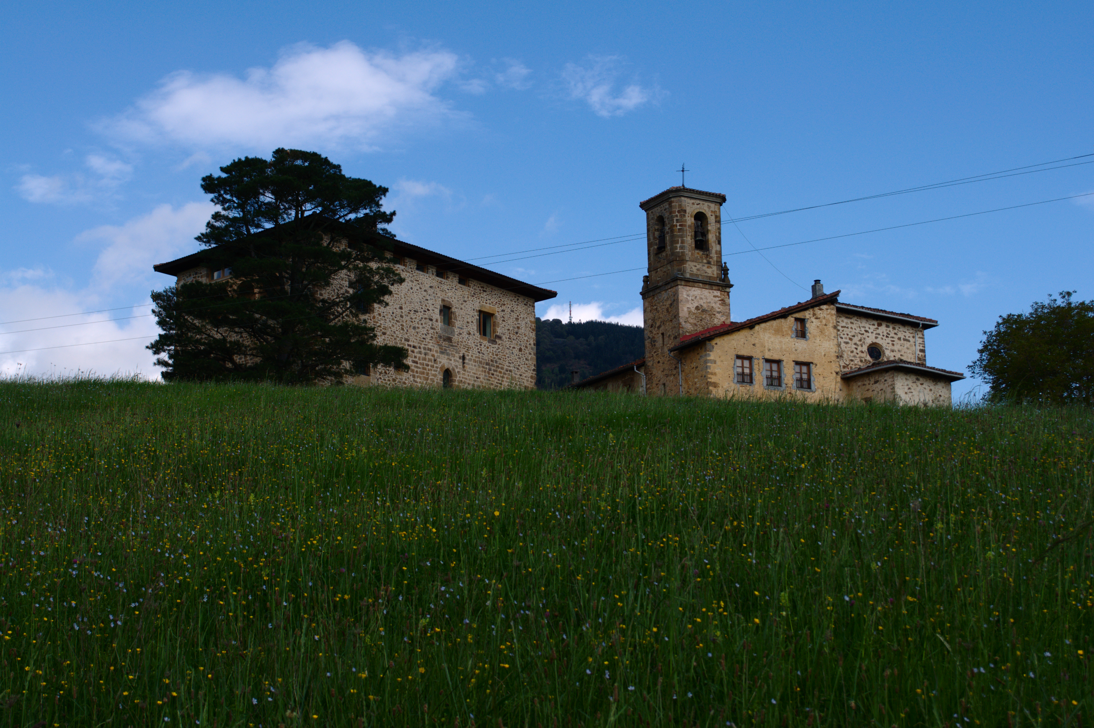 Galartza elizate aretxabaletarreko ikuspegia. Ezkerrean Galartza dorretxea eta eskuinean eliza eta abadetxea